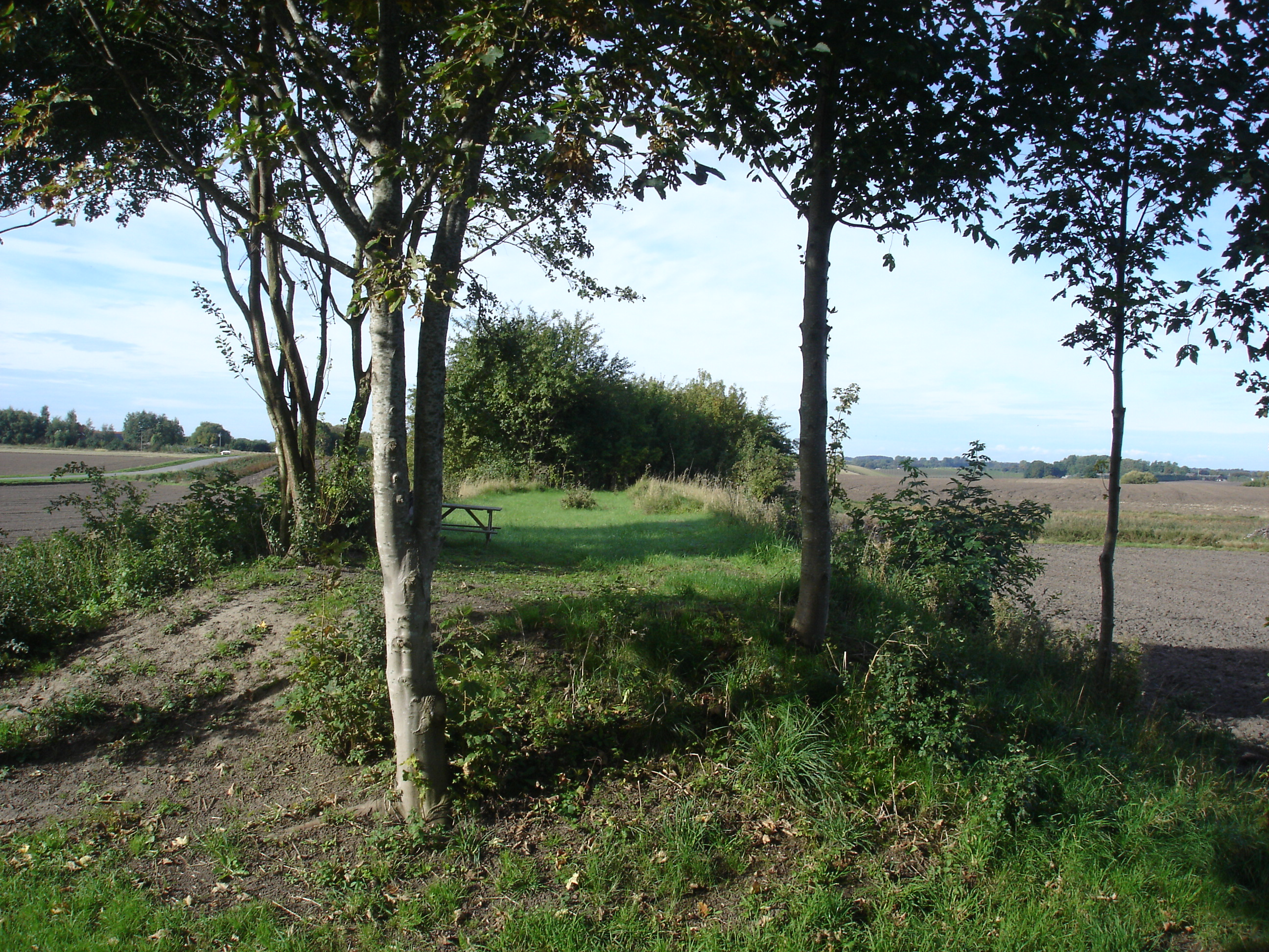 Hørve-Værslev-banens dæmning V for Bjergesø - det østligste stykke er tilgængeligt